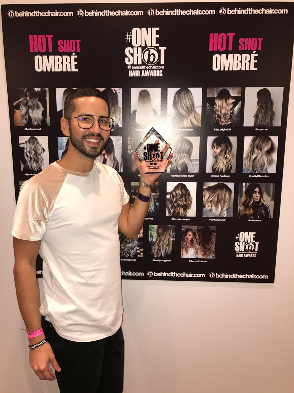 Павел Шефф получает награду Behindthechair